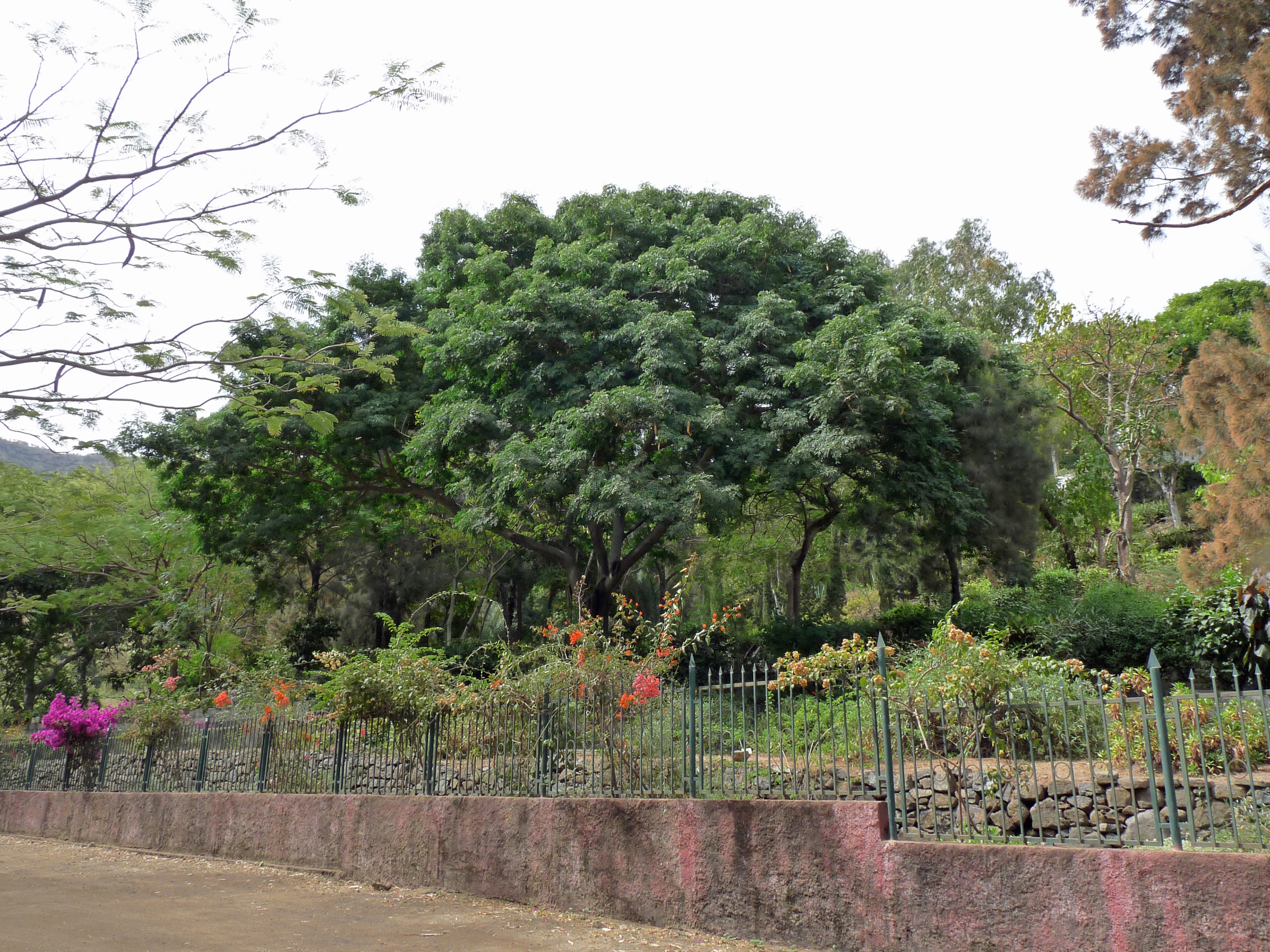 São Jorge dos Órgãos (Santiago, Cap-Vert) : Jardin botanique national Grandvaux Barbosa